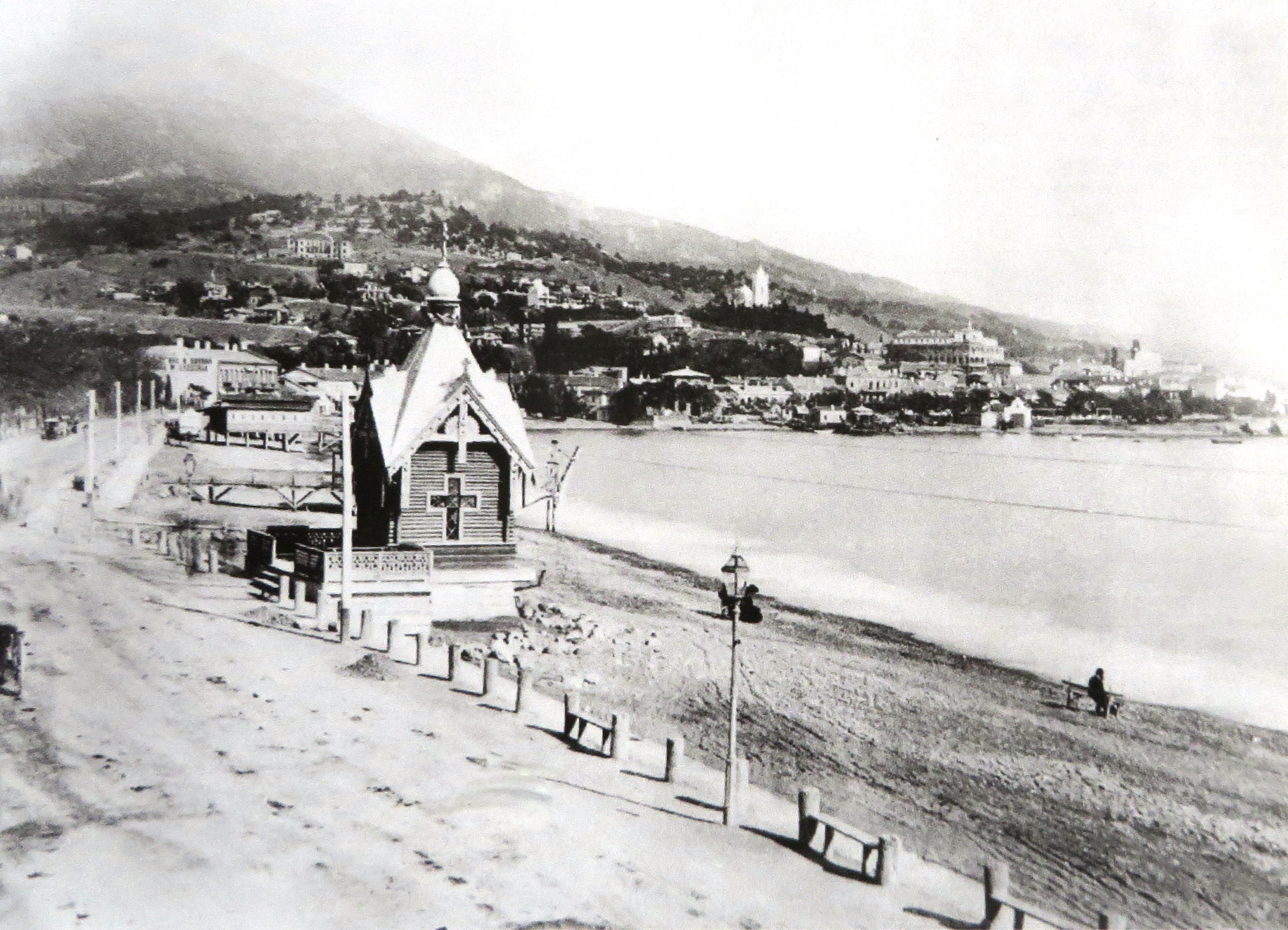 Старая часовня памяти Александра 2-го. Фото 19 века